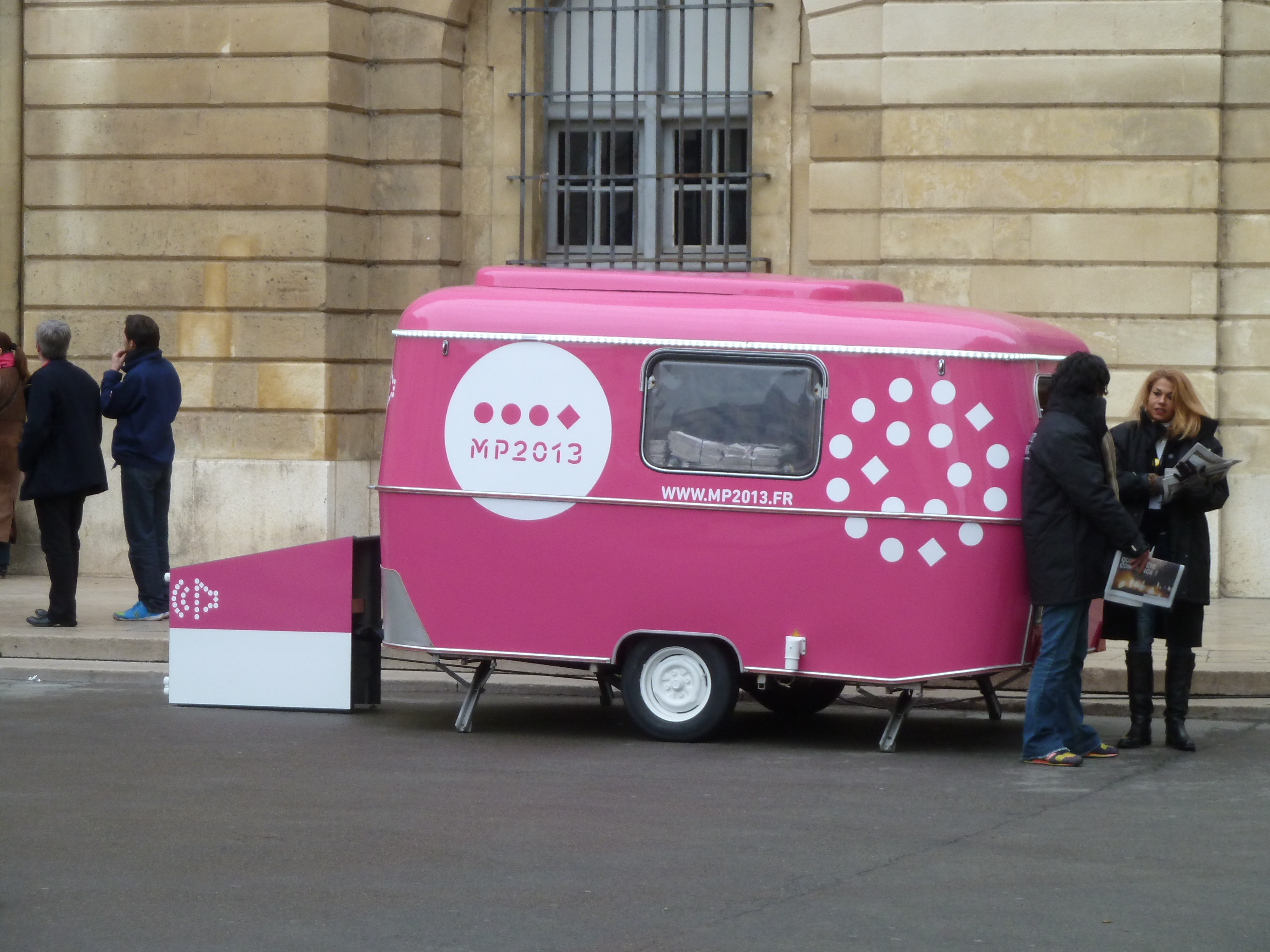 Opening Marseille-Provence 2013, Arles (13), France 13.01.2013